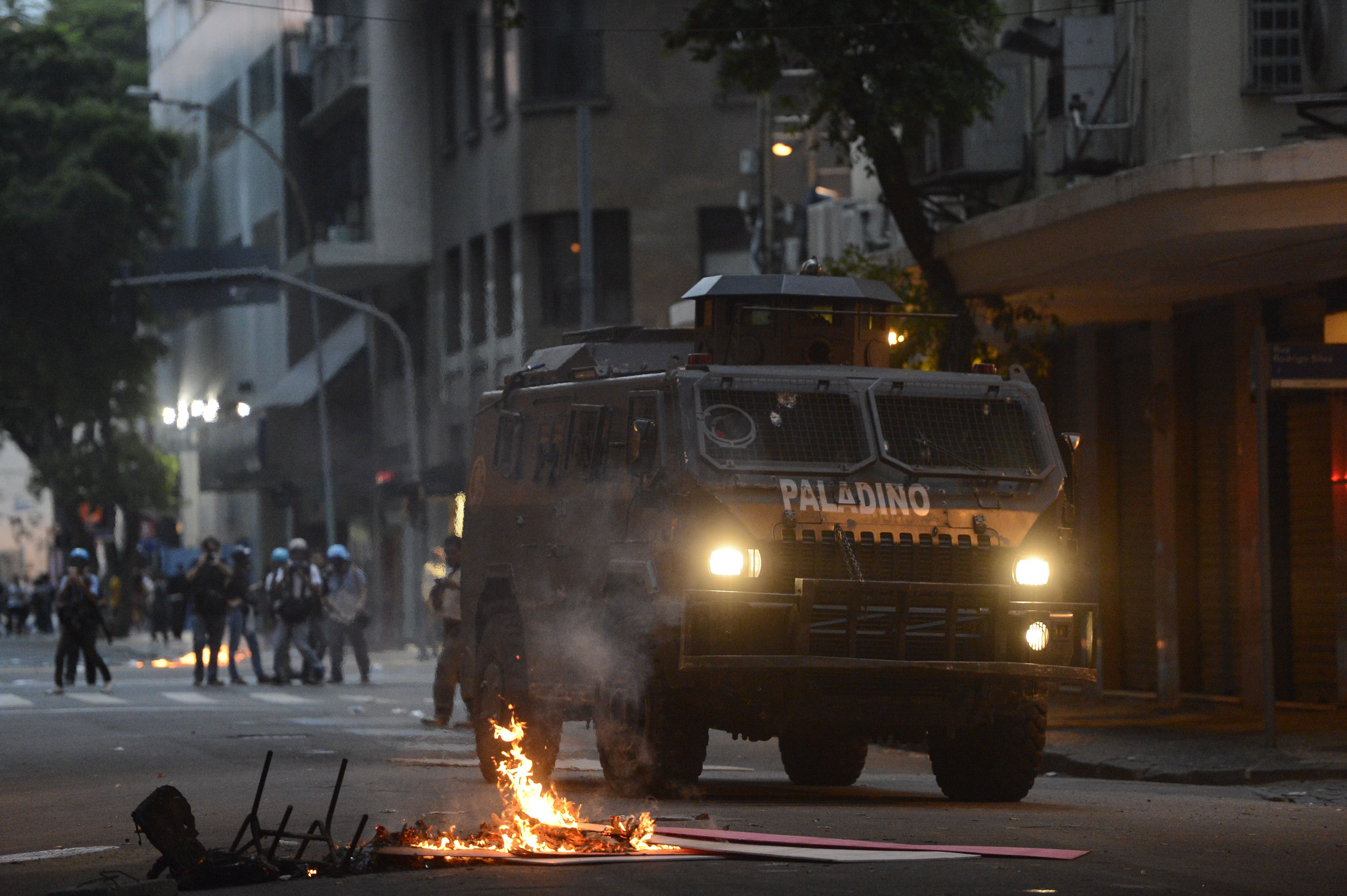 Viatura do BOPE no confronto durante manifestação de funcionários da CEDAE e servidores de outras categorias nas ruas em frente à Assembleia Legislativa do Estado do Rio de Janeiro (Alerj).